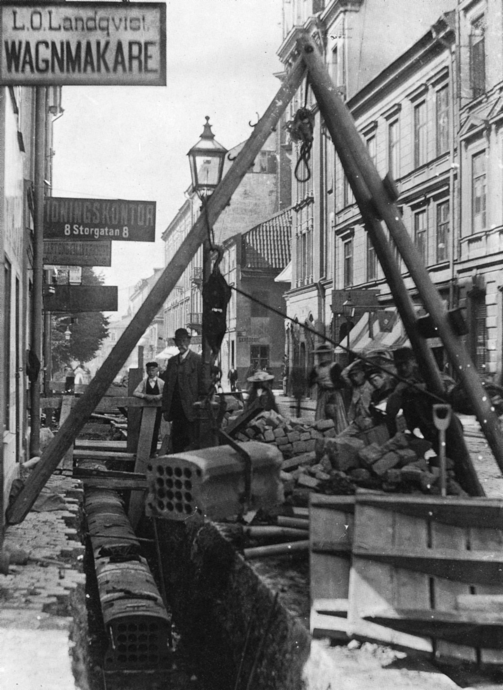 Nedläggning av telefonkablar i Storgatan, Stockholm